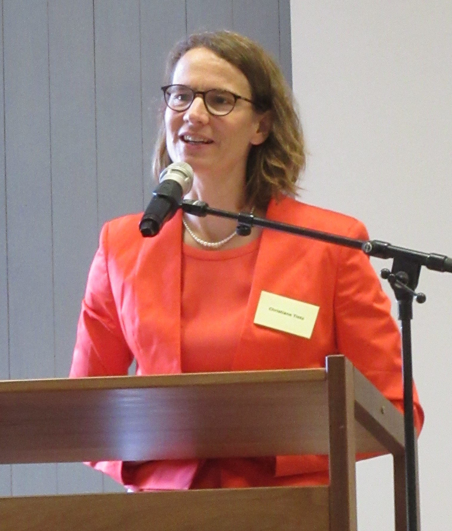 Christiane Tietz beim XII. INternationalen Bonhoeffer-Kongress in Basel im Juli 2016